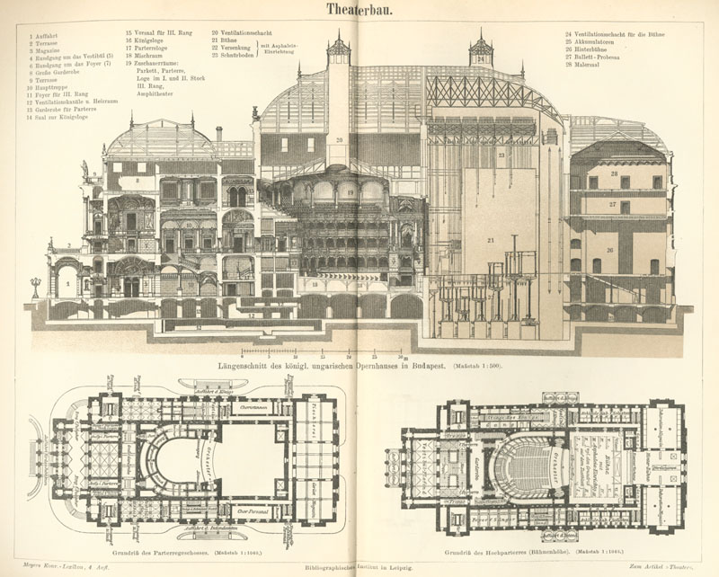 Theaterbau. Public Domain aus Meyers Konversationslexikon 1888